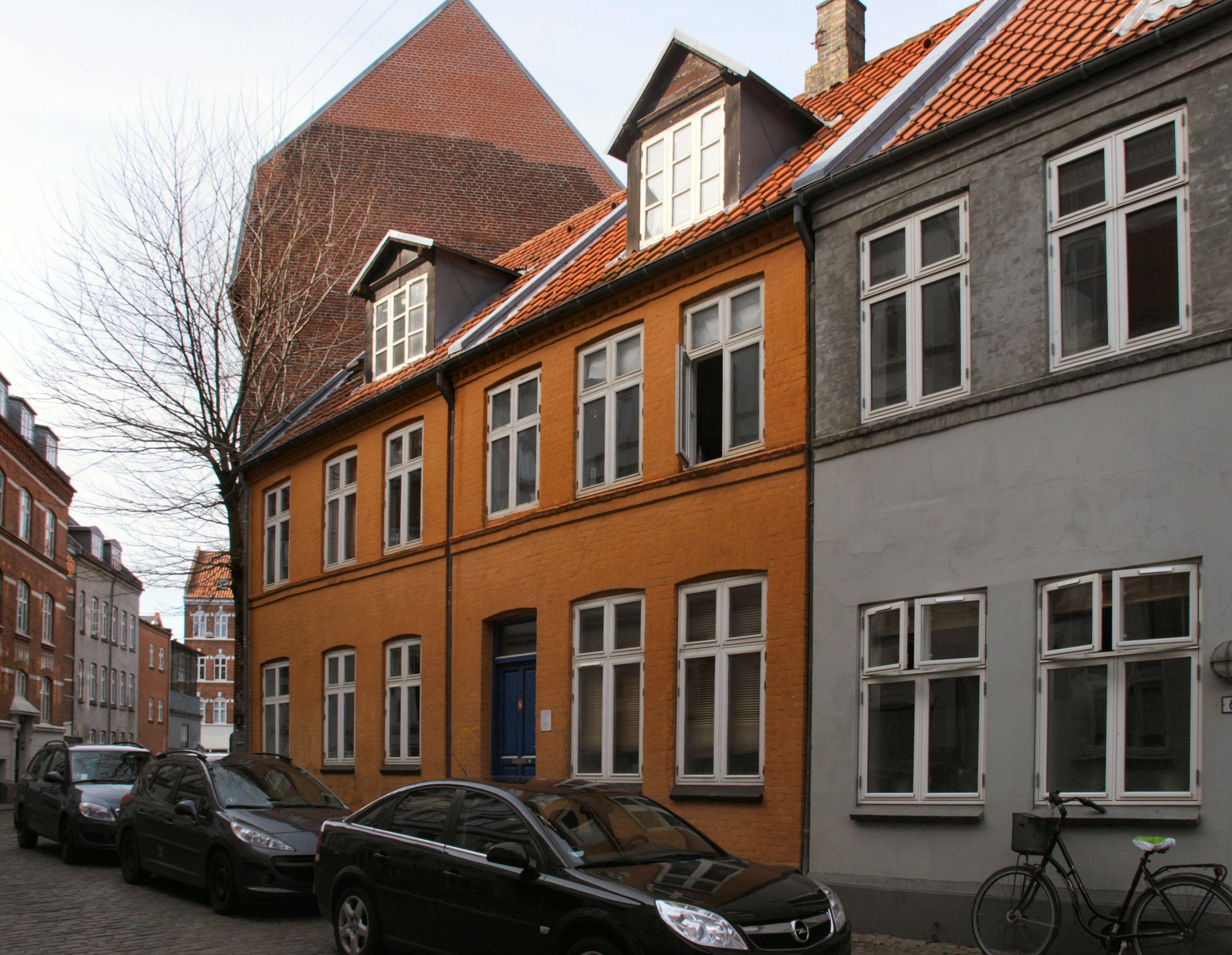 kollektivet Anholtgade 8, Aarhus, Danmark